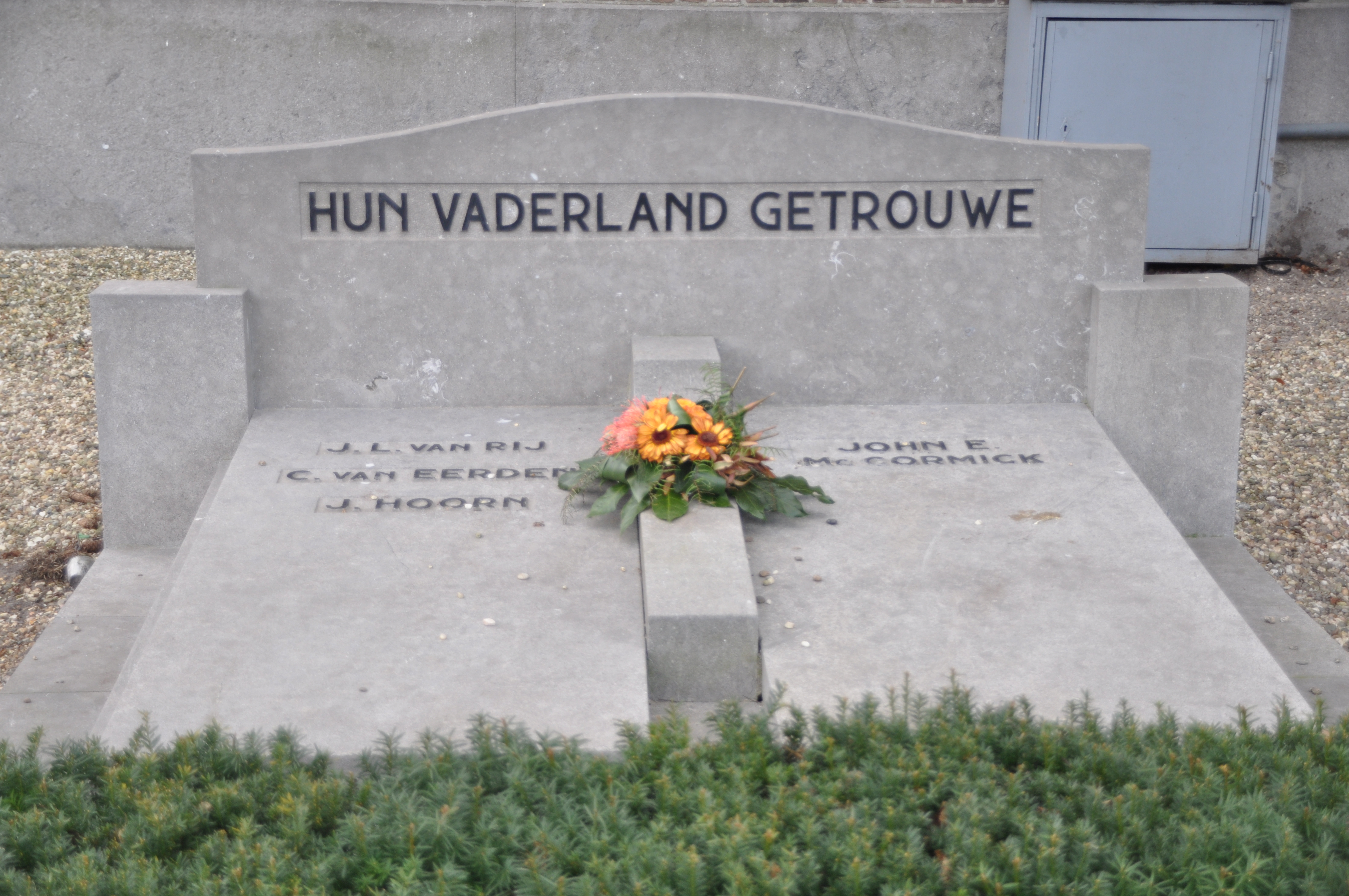 Zoetermeer, oorlogsmonument 2456 Ontwerp: Jan Buijs Onthuld: 29 maart 1949